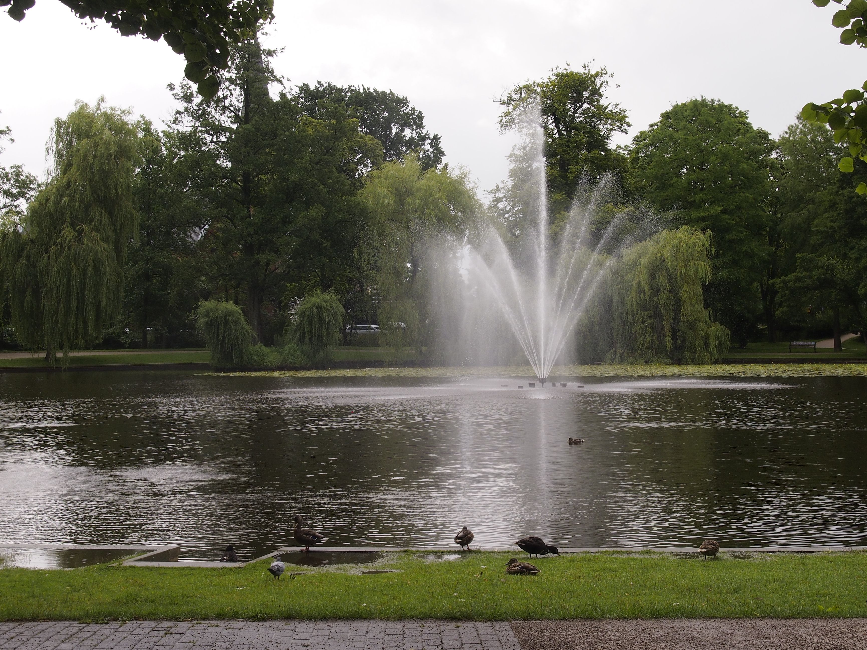 Wasserfontäne im Französischen Garten in Celle (Niedersachsen)